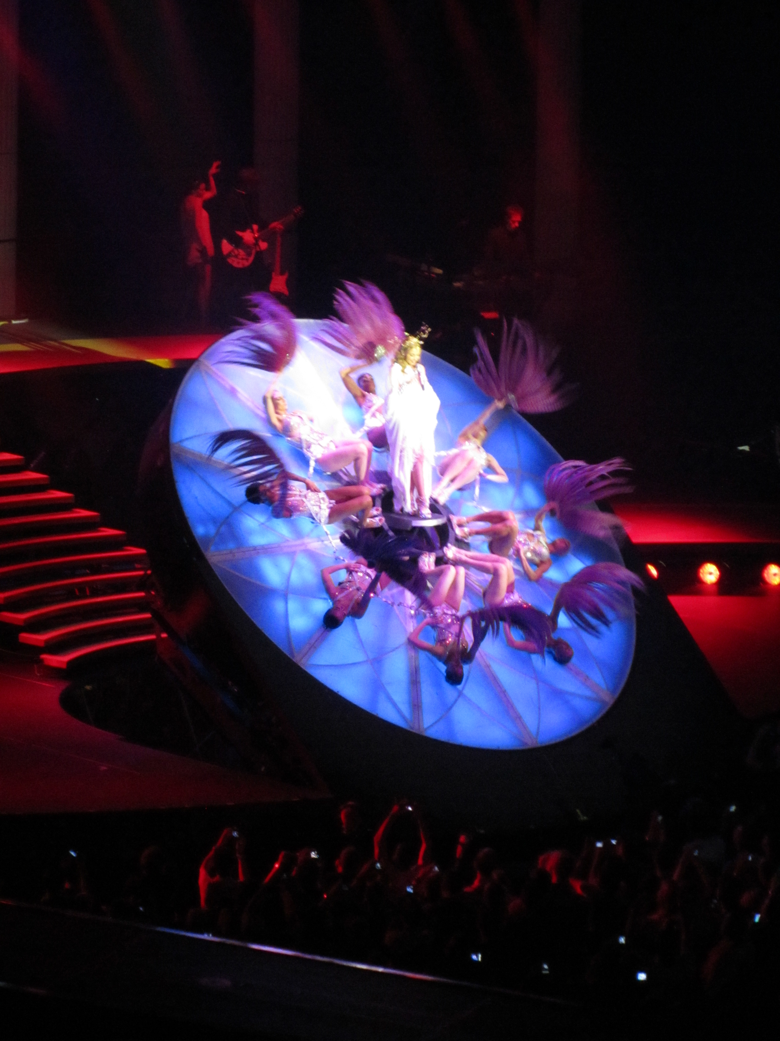 Minogue interpretando «Slow» en Aphrodite Les Folies Tour, Reino Unido.